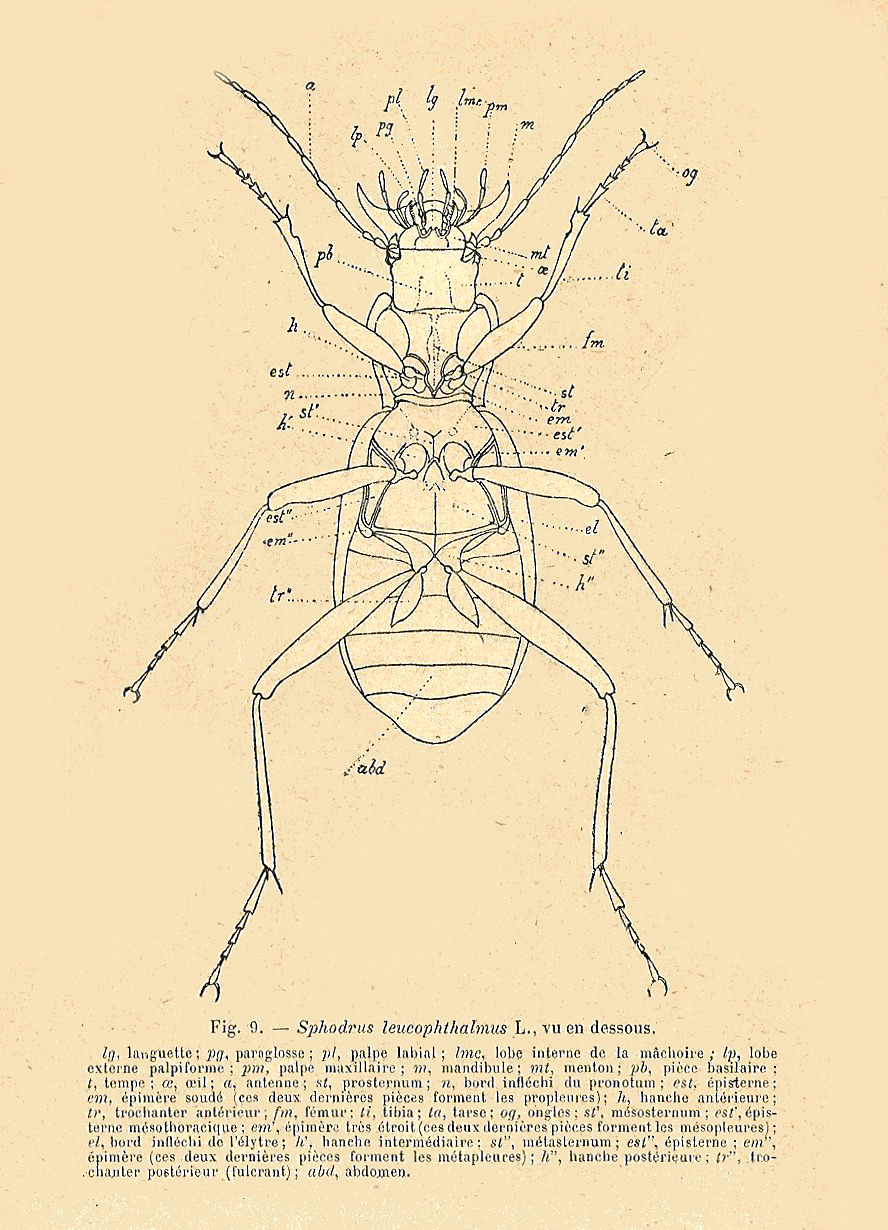 Description de pièces anatomiques d'insectes, dessins au trait avec légendes en français.